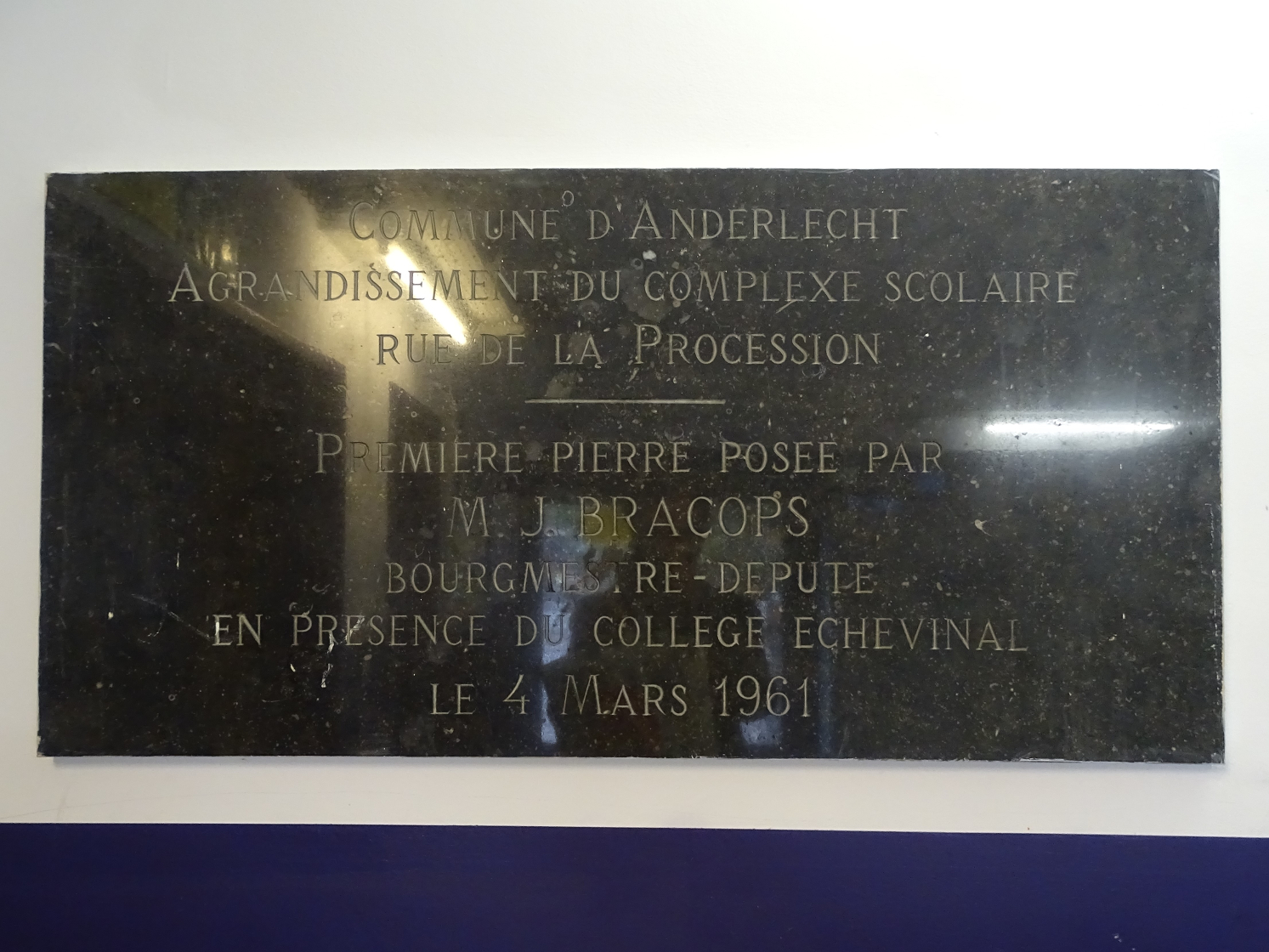 Vue de la plaque commémorative de la pose de la première pierre de l'extension de l'école rue de la Procession, 1961, Anderlecht.